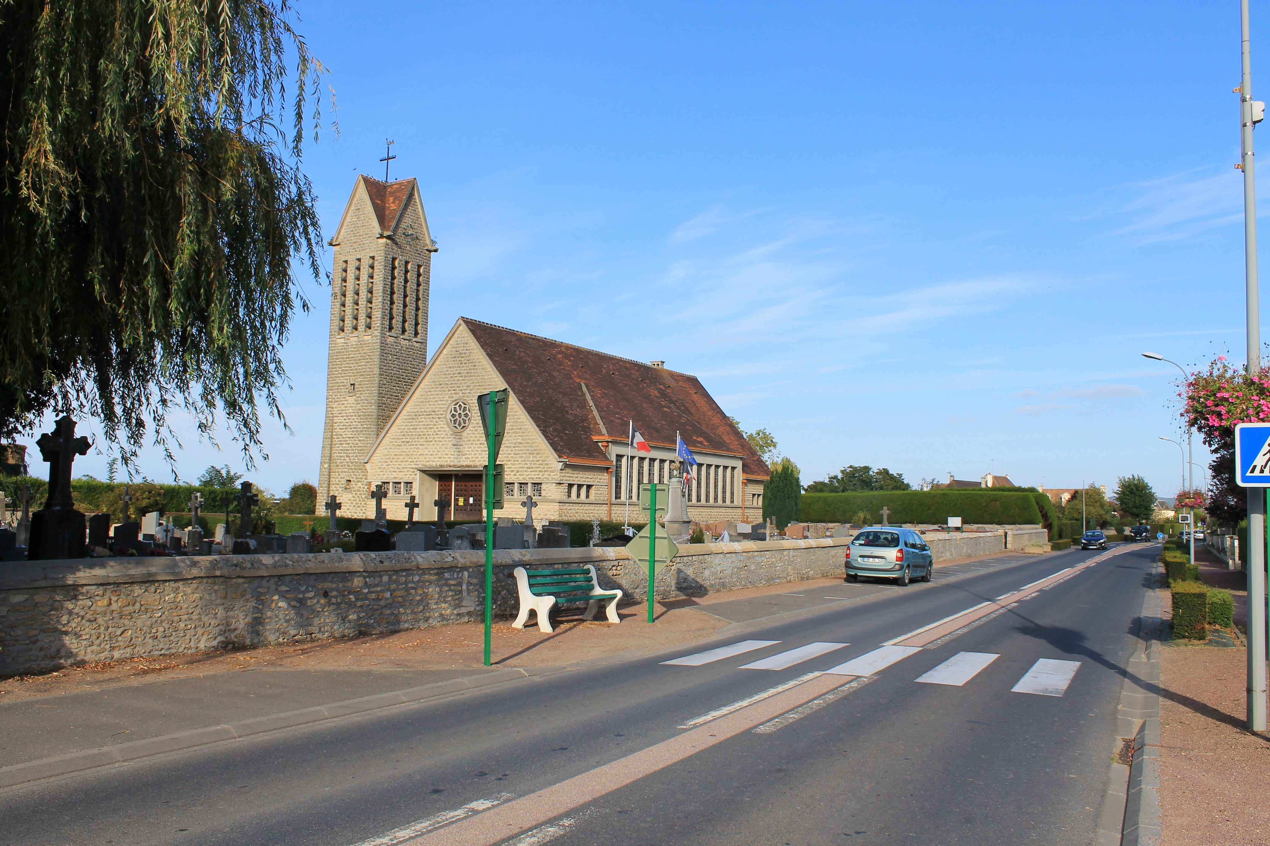 Eglise de Varaville (Calvados)